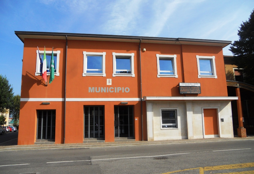 Municipio - San Zeno Naviglio